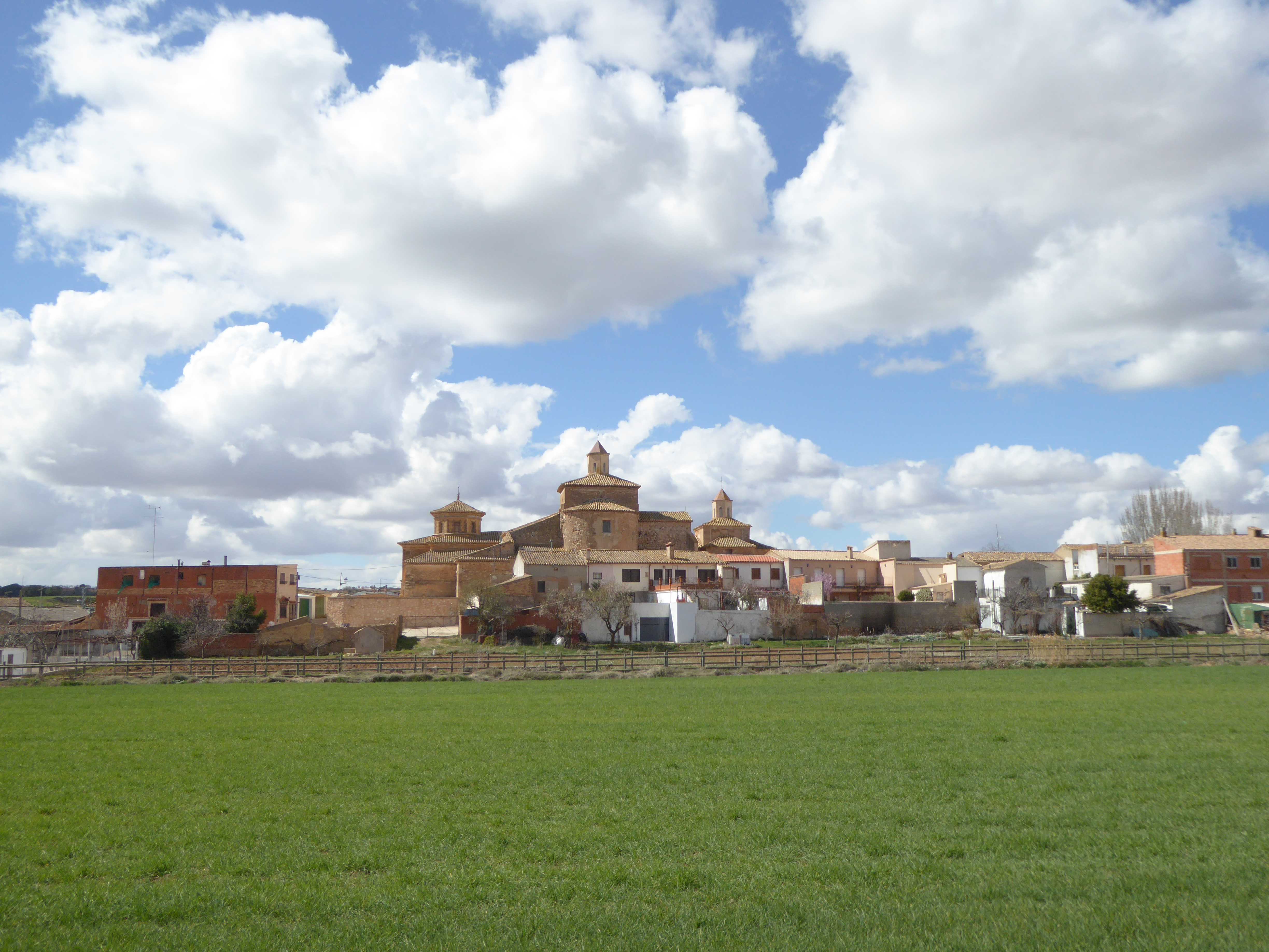 Buenache de Alarcón